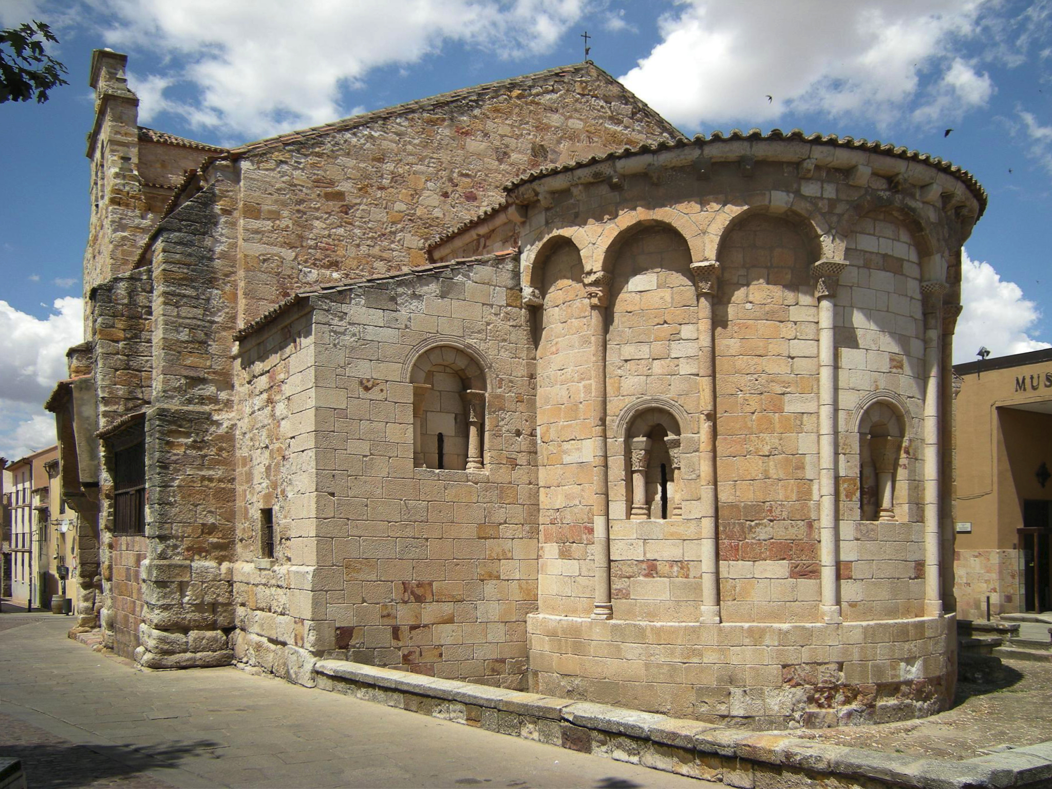 Iglesia románica de Santa María la Nueva de Zamora }